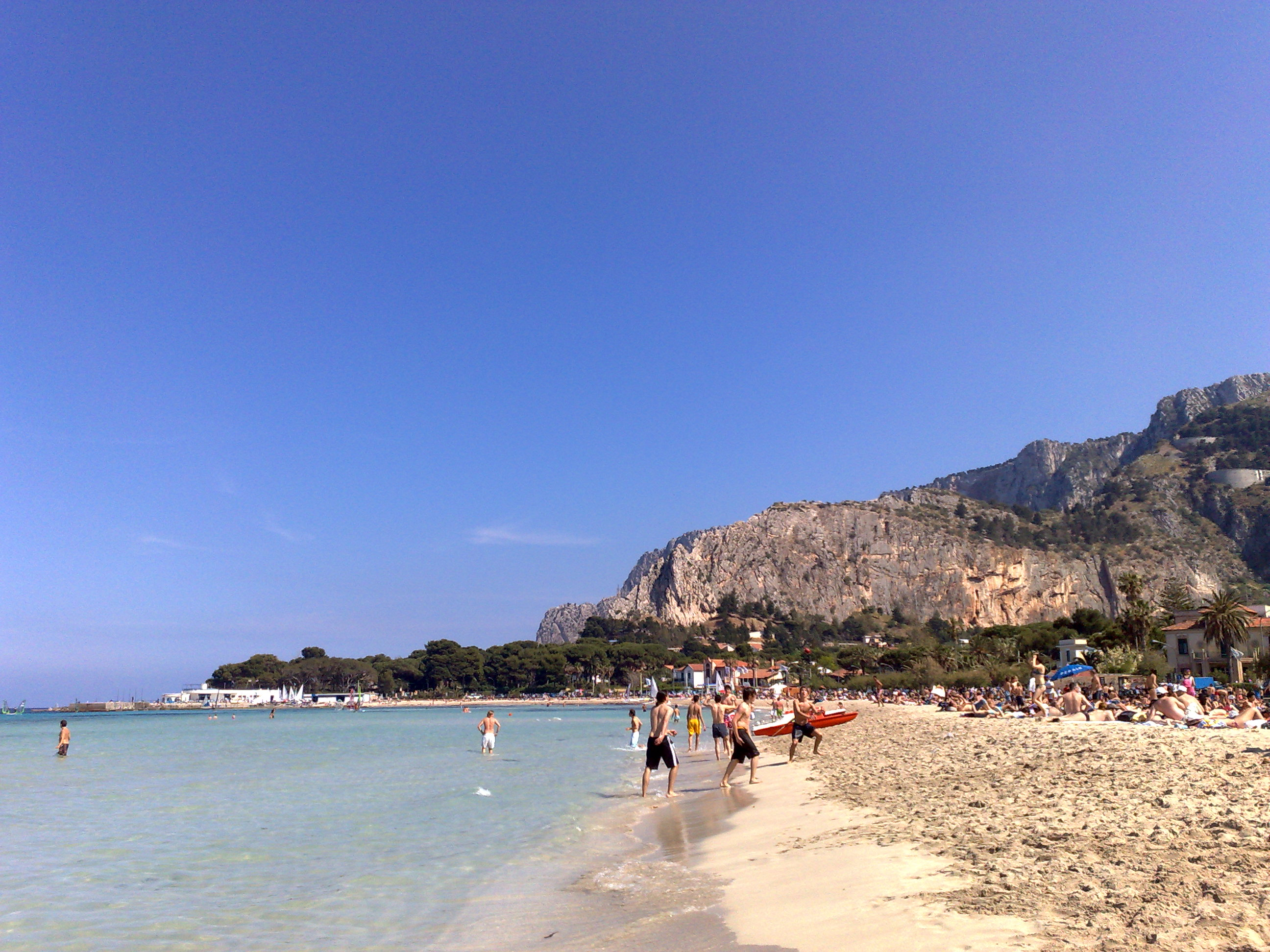 Mondello beach, Palermo